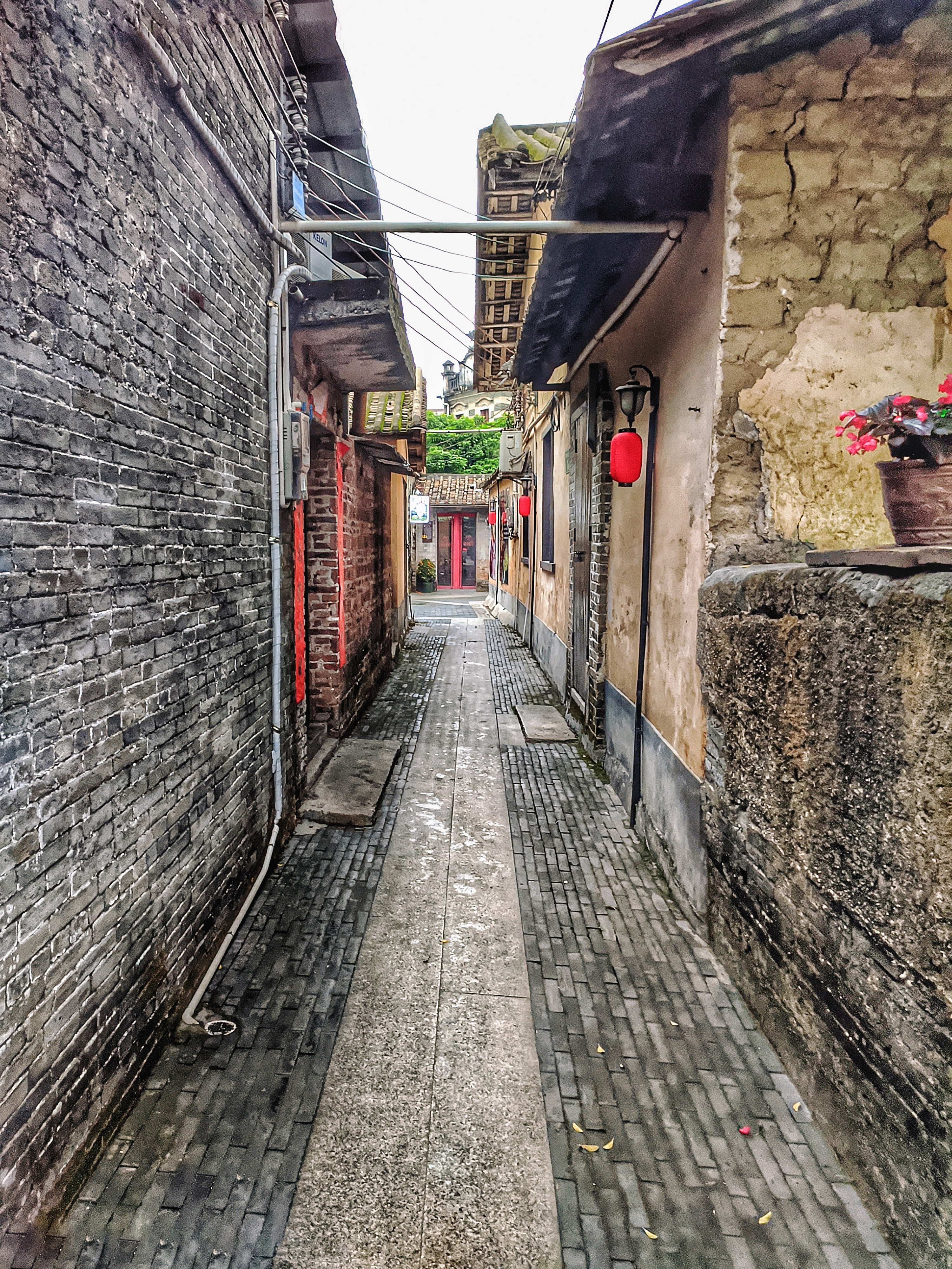 粵語: 洛場村條路（花山小鎮範圍）